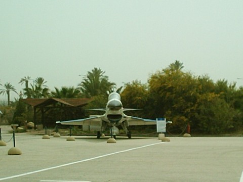 IAI Lavi at Israeli Air Force Museum